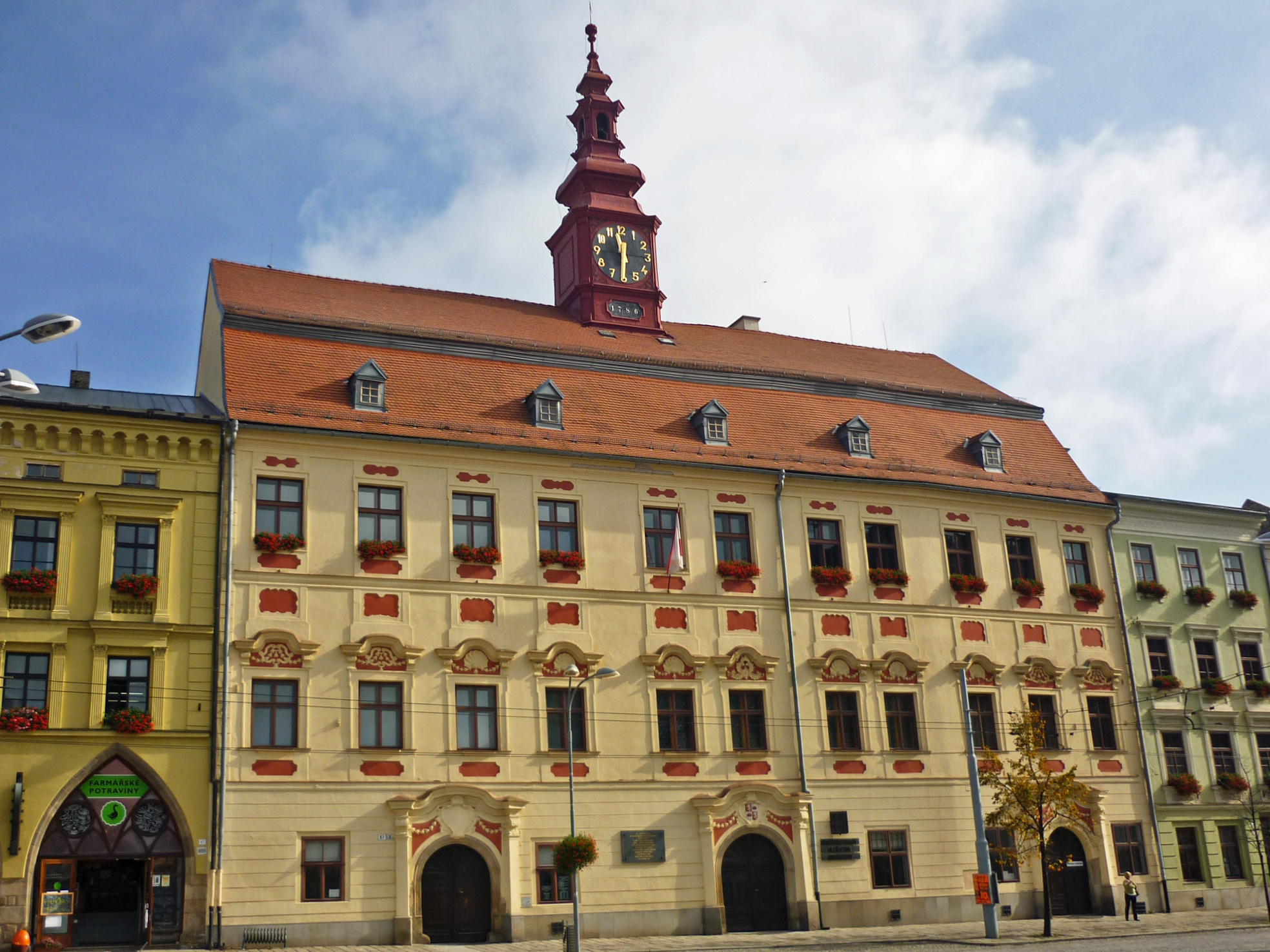 Rathaus in Iglau (Jihlava)